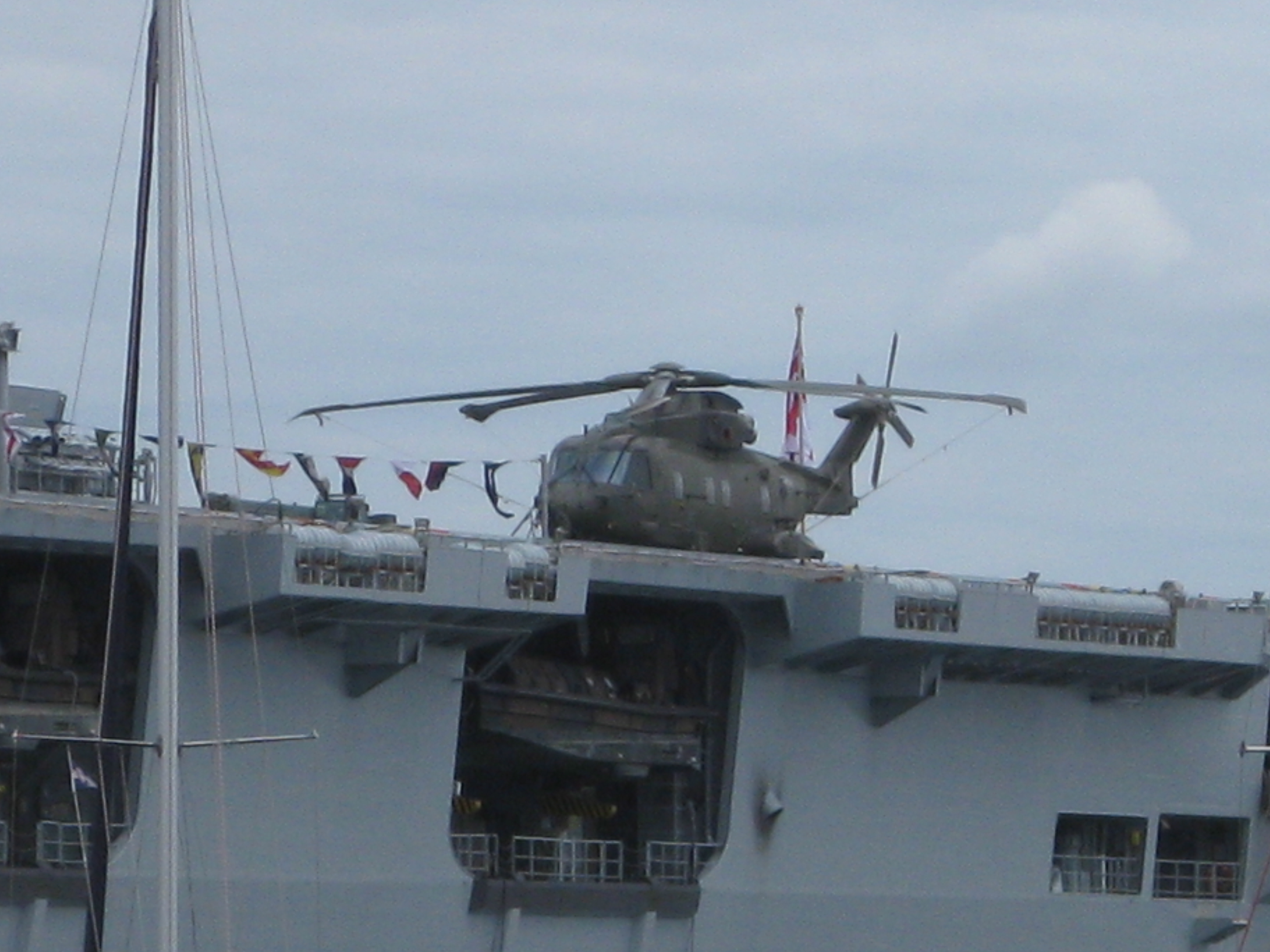 HMS Ocean (L 12) Hubschrauber an Deck